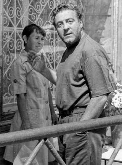 Съёмки кинофильма «Полицейские и воры» в городе Переславле-Залесском на повороте с Ростовской улицы на Плещеевскую улицу. В центре артист Геннадий Викторович Хазанов.